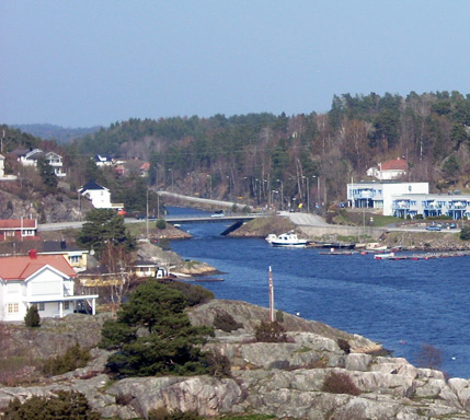 Indre del av Neskilen på Eydehavn, med Neskilbroa og det gamle kommunehuset som er ombygd til leiligheter. Eydehavn Service og Marina til høyre i bildet.